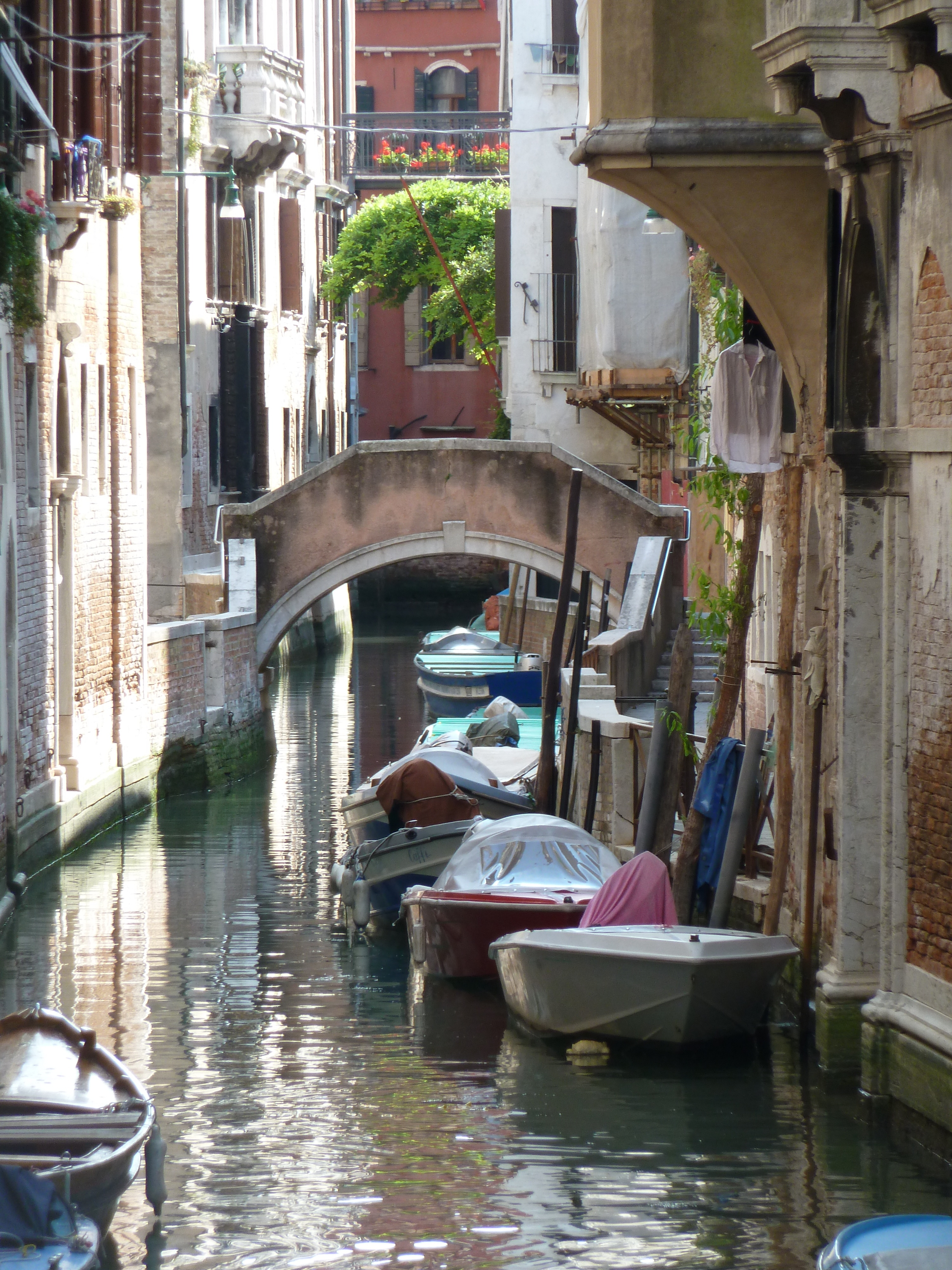 Ponte delle Tette (Venice)